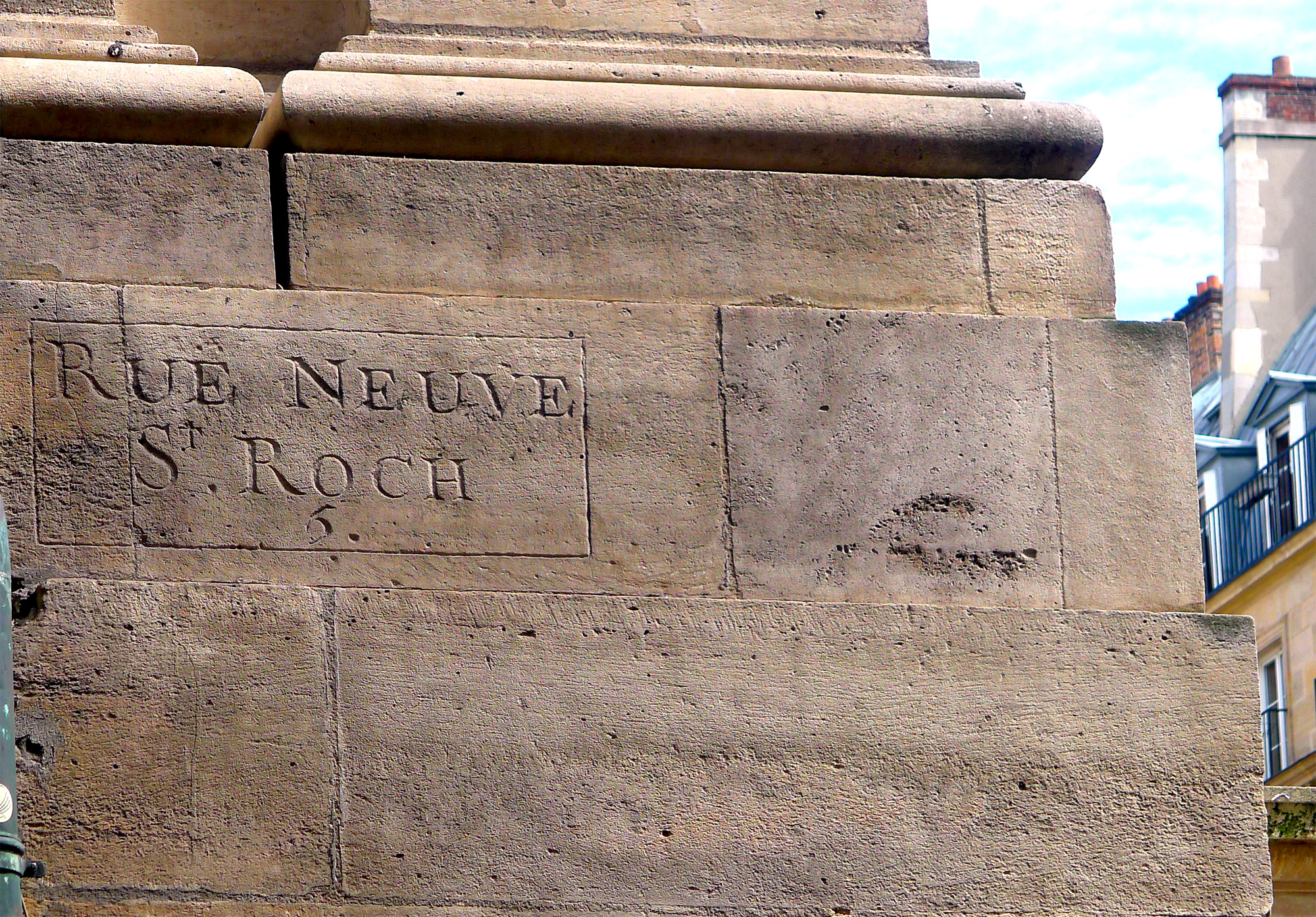 Rue Saint-Roch (ancien nom gravé) - Paris Ier